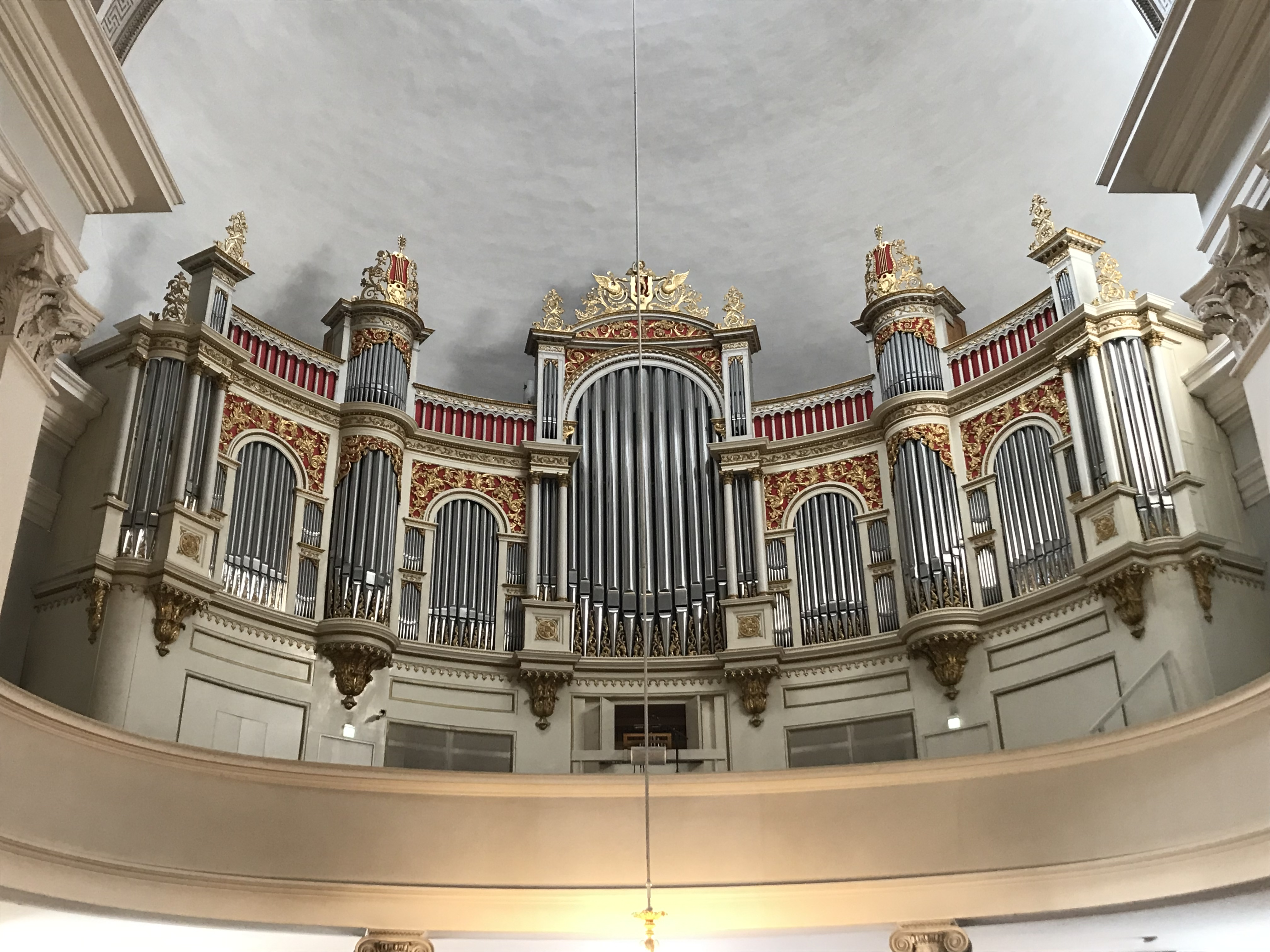 Die Marcussen & Søn- Orgel des Doms von Helsinki